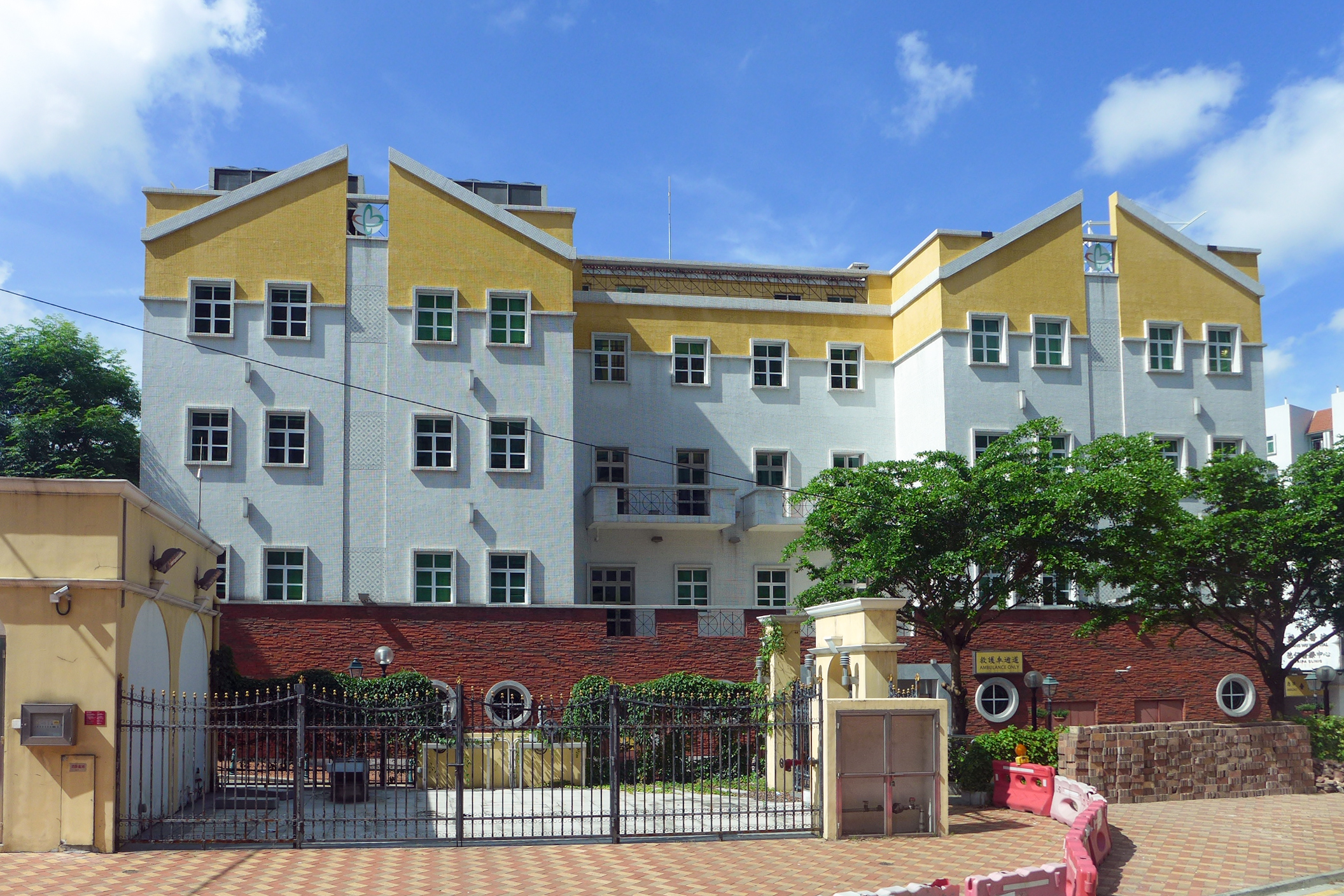 Kiang Wu Hospital Taipa Clinic